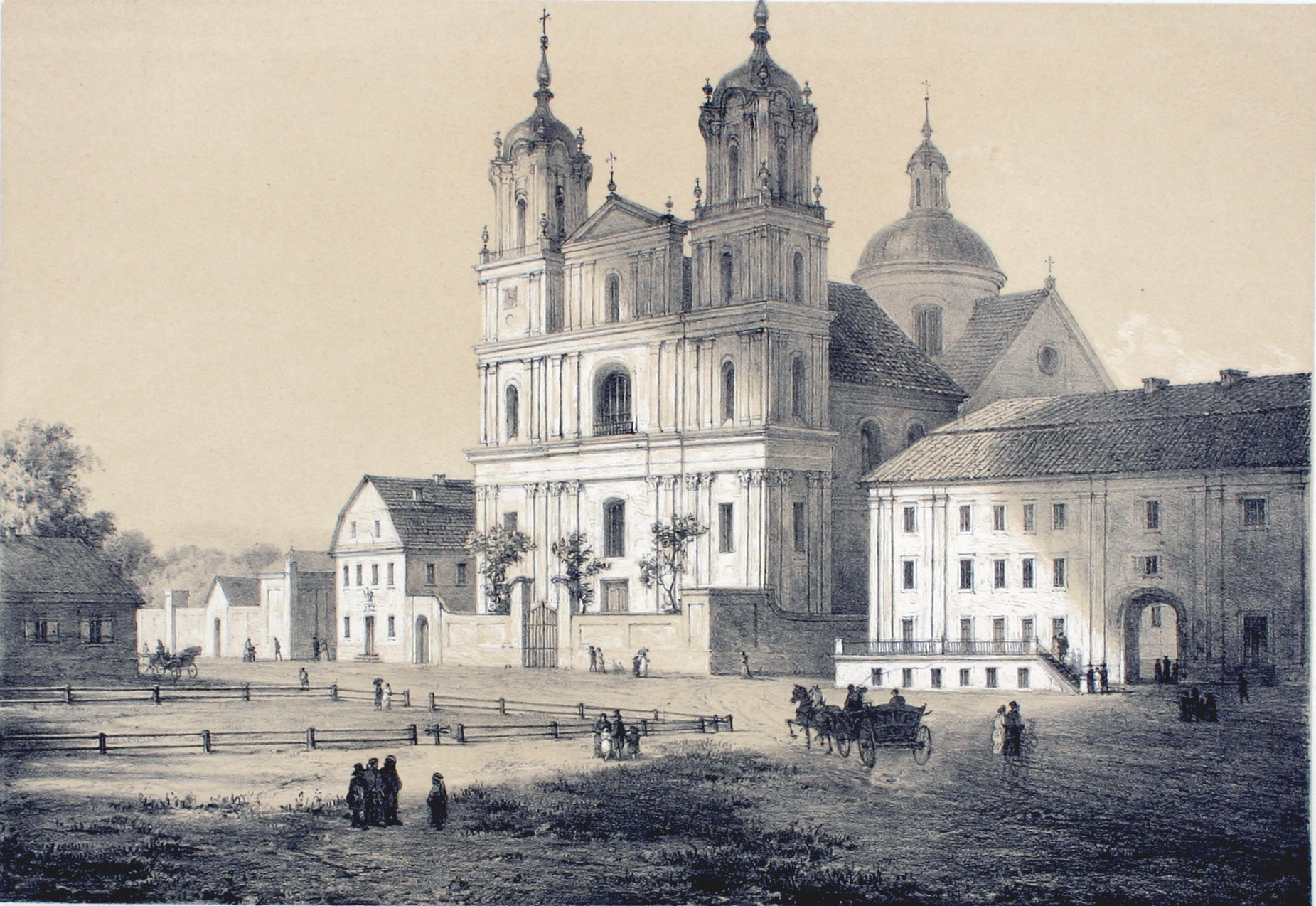 Гродна, плошча Стары Рынак Беларуская (тарашкевіца): Горадня (Horadnia), пляц Стары Рынак (plac Stary Rynak)